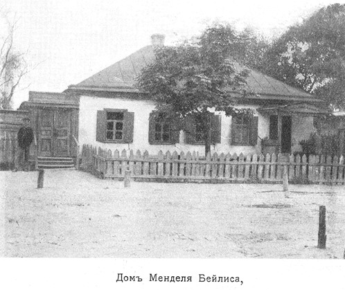 Дом Менделя Бейлиса House of Beilis